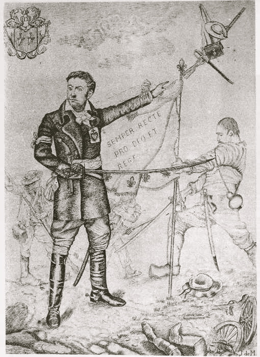 Augustin de Hargues d'Hétivaux, général de cavalerie